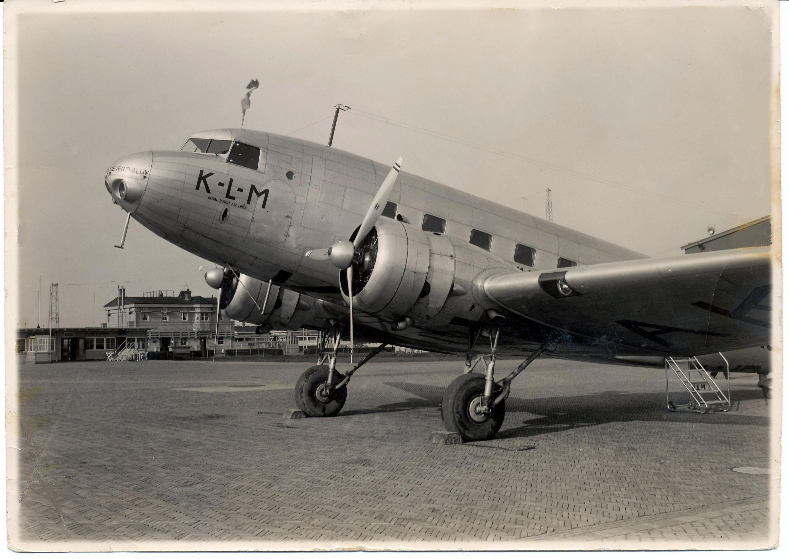 PH-AKO Douglas DC-2-115E c.n 1361 KLM Oeverzwaluw. op vliegveld Eelde, tweede helft jaren '30.